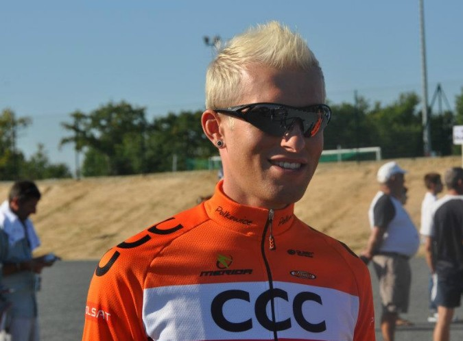 Tomasz Marczynski